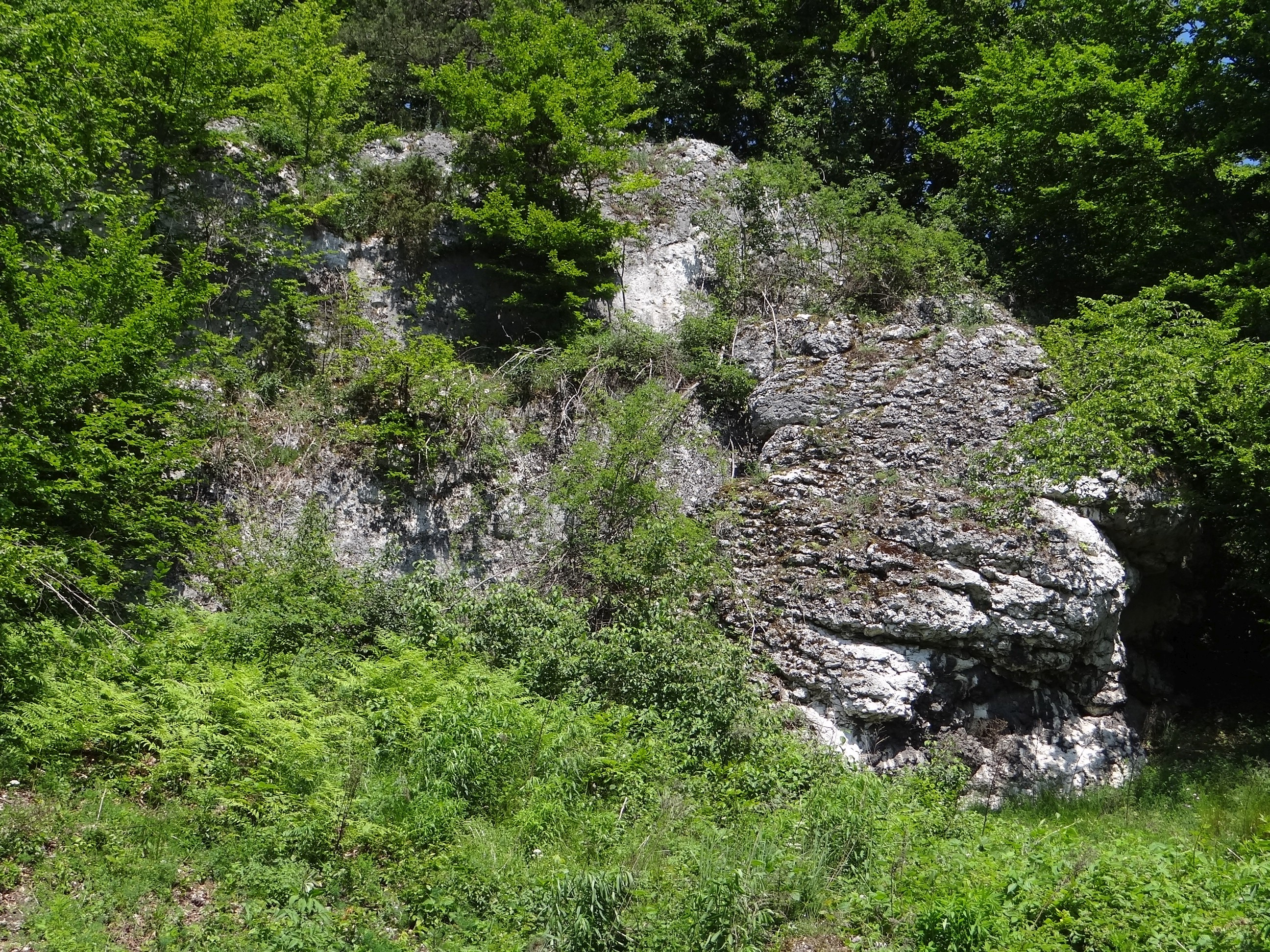 Skałki w Ryczowie